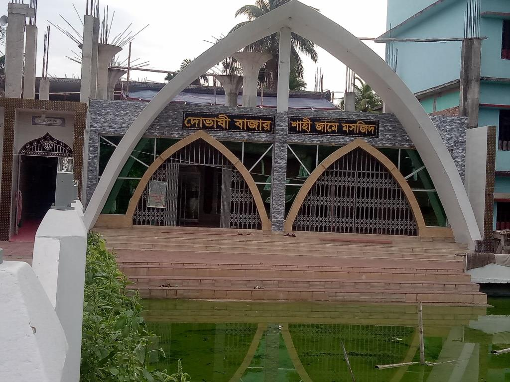 দোভাষী বাজার এ অবস্থিত একমাত্র জামে মসজিদ , ২০১৯ সালে পুনঃ নির্মিত হয়।